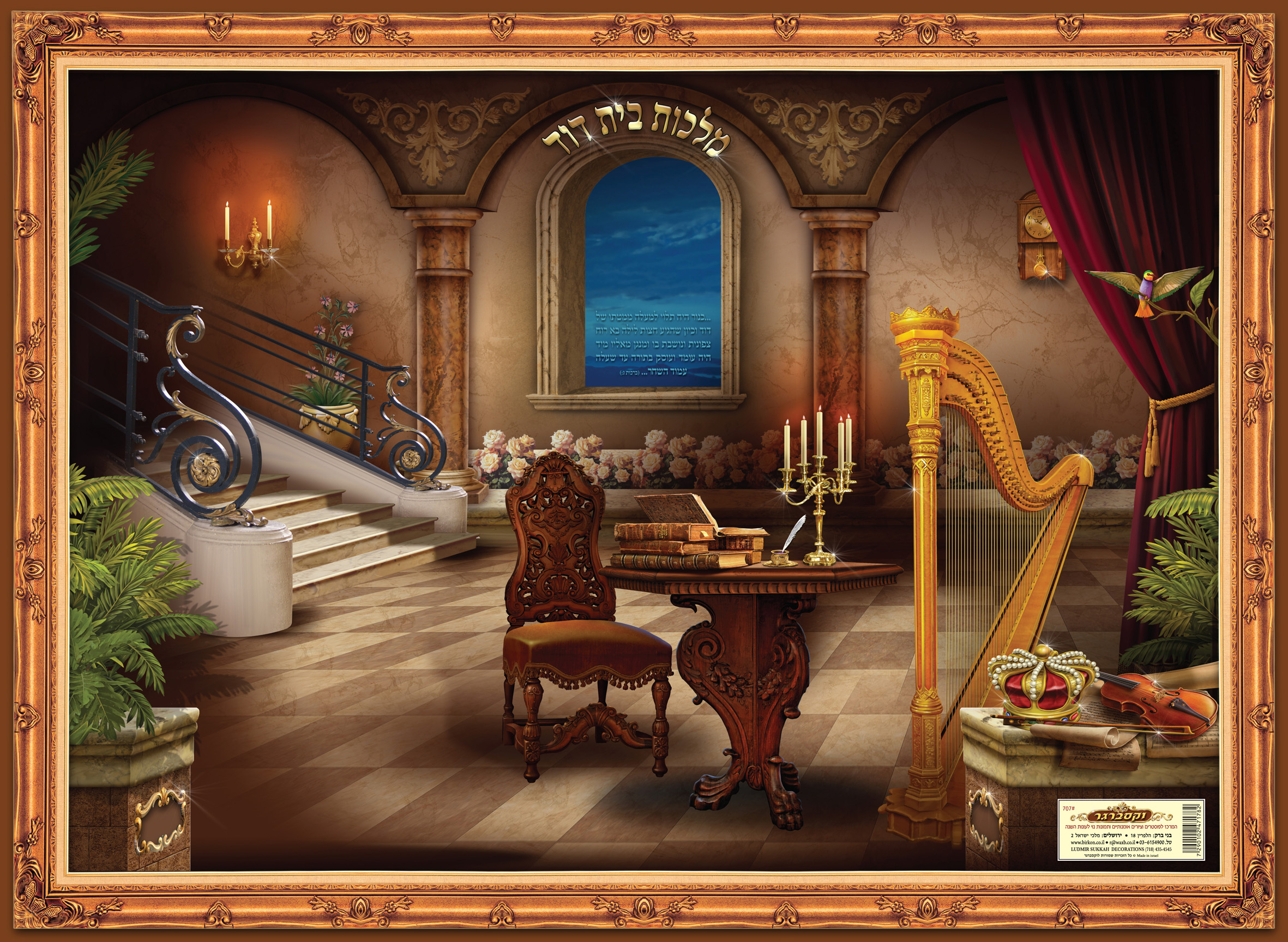 איור מקורי של מלכות וקסברגר